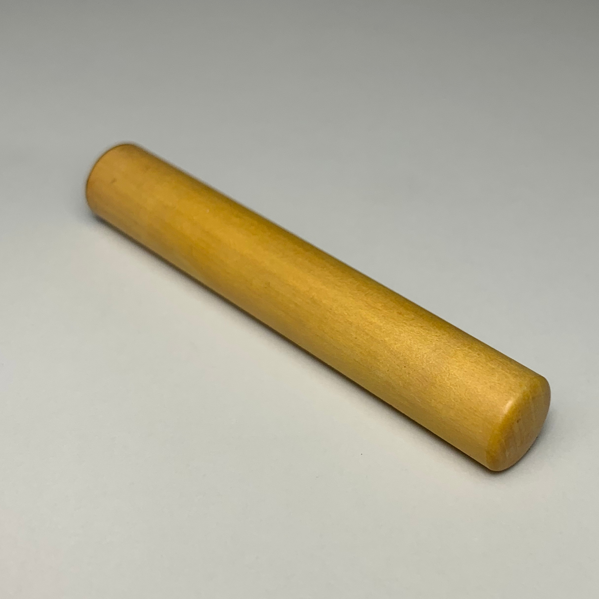 御蔵島黄楊で作られた印鑑（10㍉×60㍉）